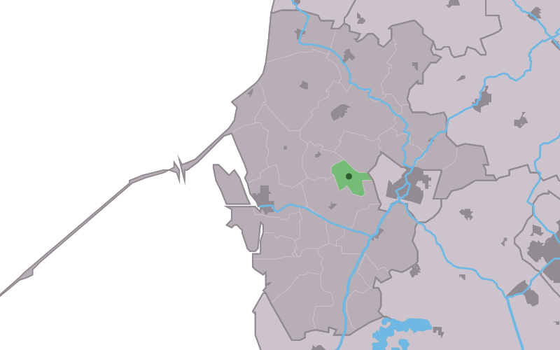 Kaartsje fan himrik fan Longerhou